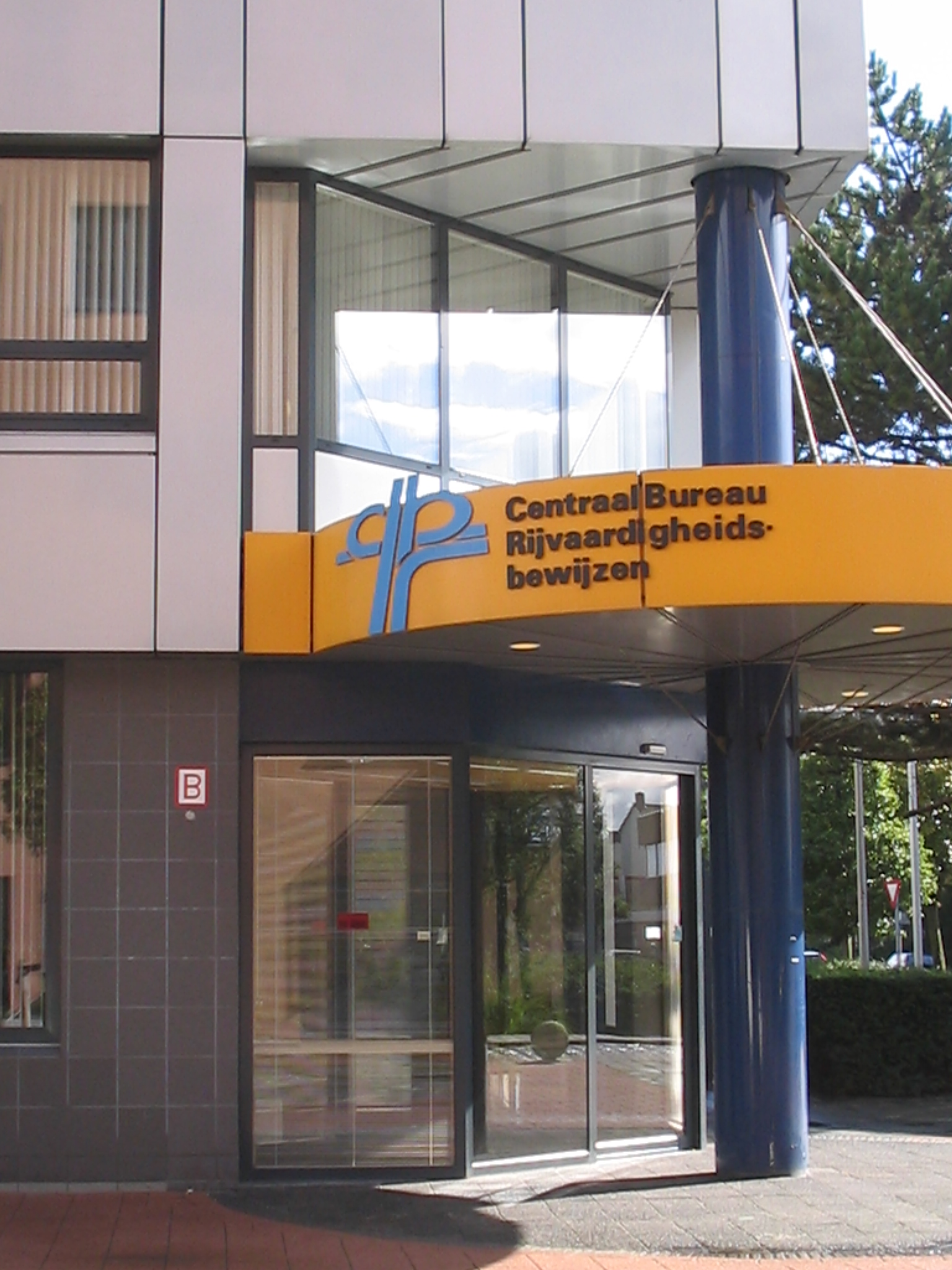 CBR office entry and logo, Rijswijk, 2 oktober 2005